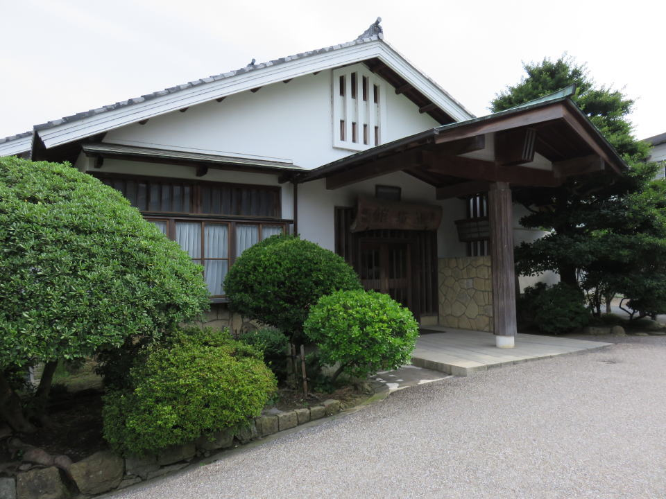 姫路城迎賓館